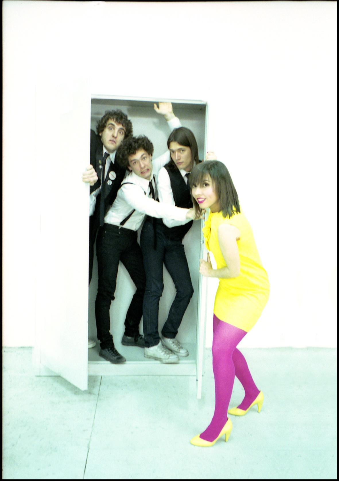 Suzy & Los Quattro